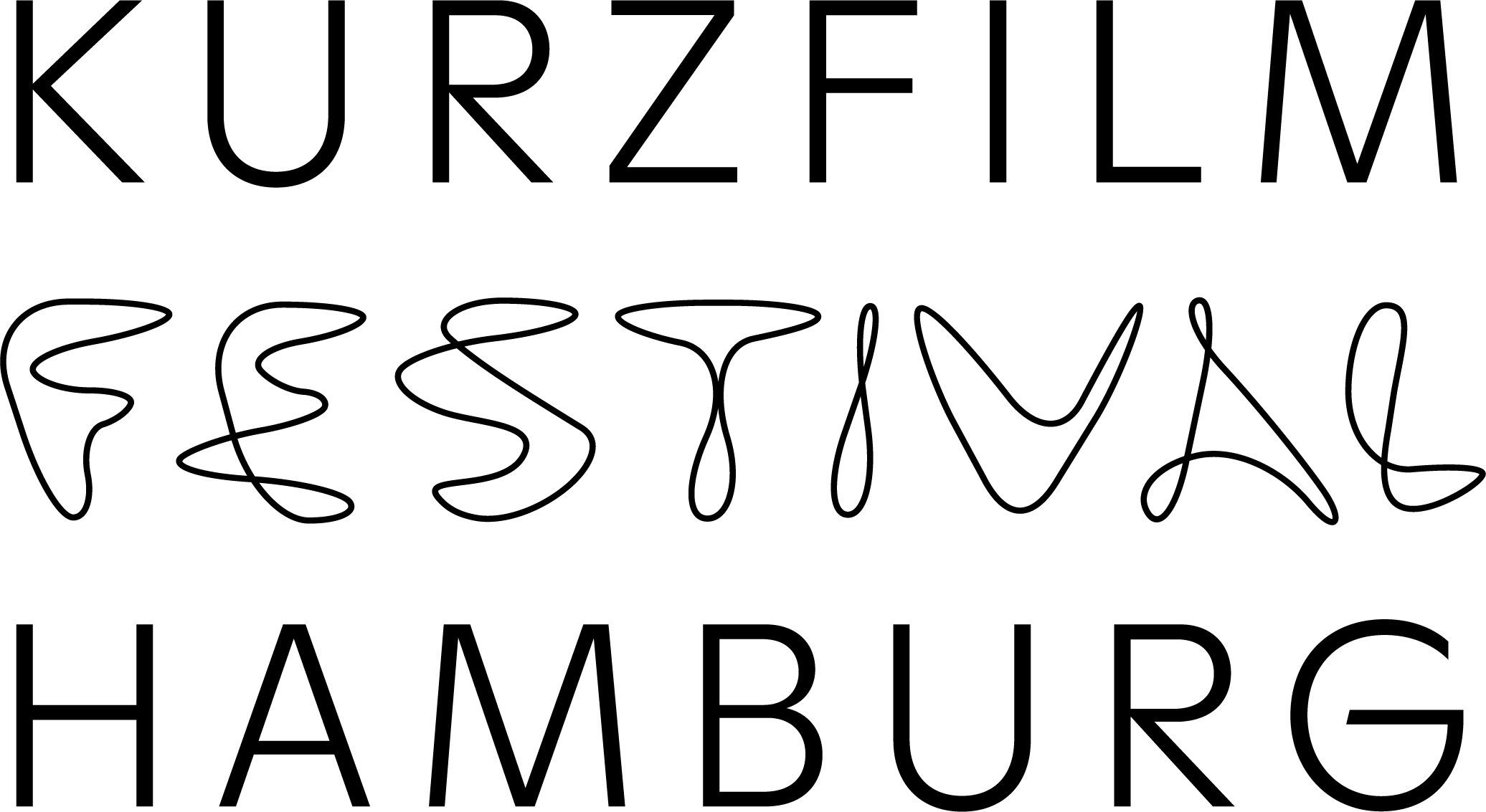 Das neue Festival Logo von 2019